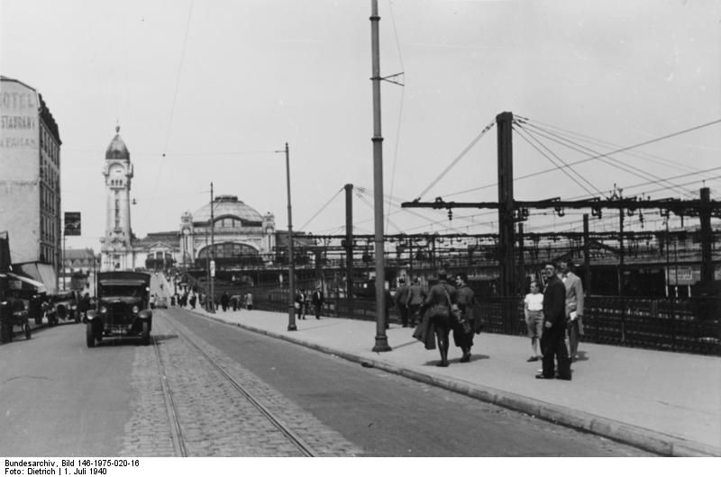 Prop.-Kp. 612 Ort: Limoges, Datum: 1.7.40 Jenseits der Demarkationslinie bieten sich das Bild der Demobilisation Soldaten und Zivilisten promenieren.